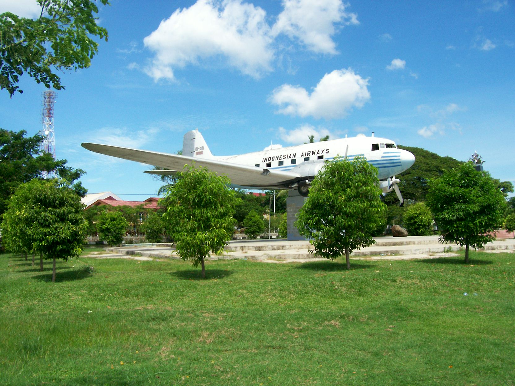 Seulawah 001 airlines